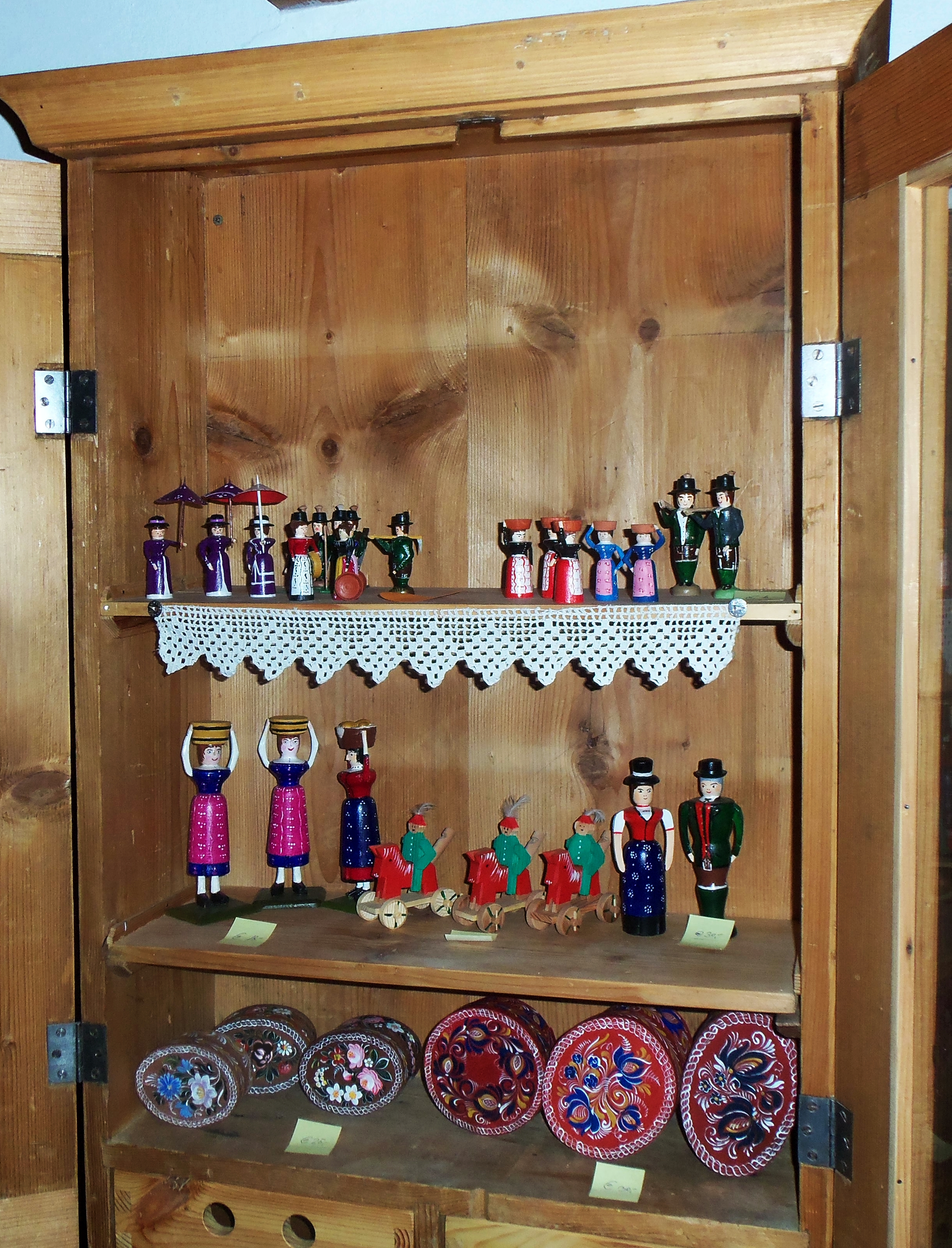 Samlung von handgemachte Speilzeuge und Schachteln aus Holz